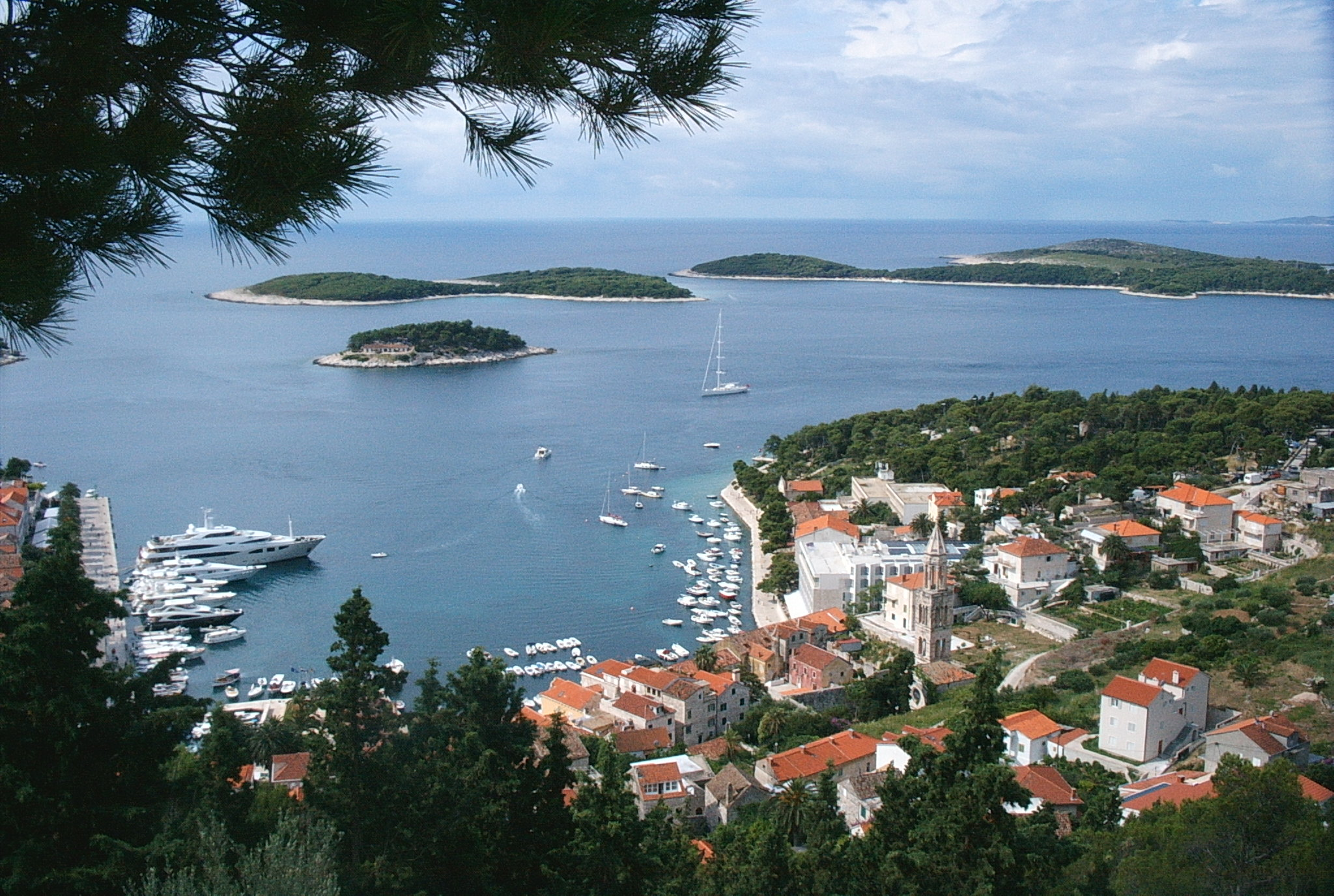 Hay belleza tan grande y tan sencilla???'